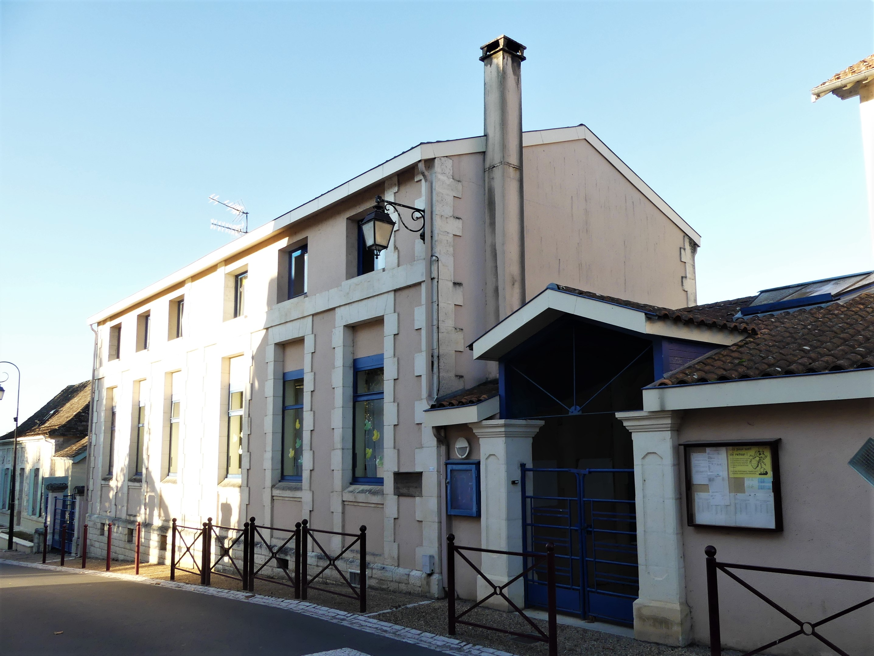 L'école de Maurens, Dordogne, France.